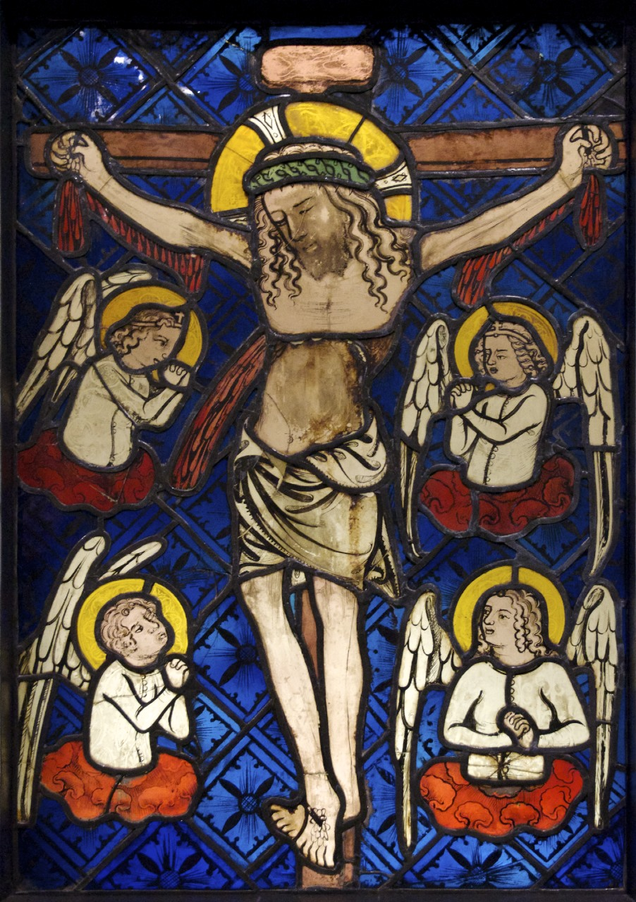 Gotická vitráž z kostela sv. Bartoloměje v Kolíně s Ukřižováním Krista (1365-1370). V expozici Národní galerie.